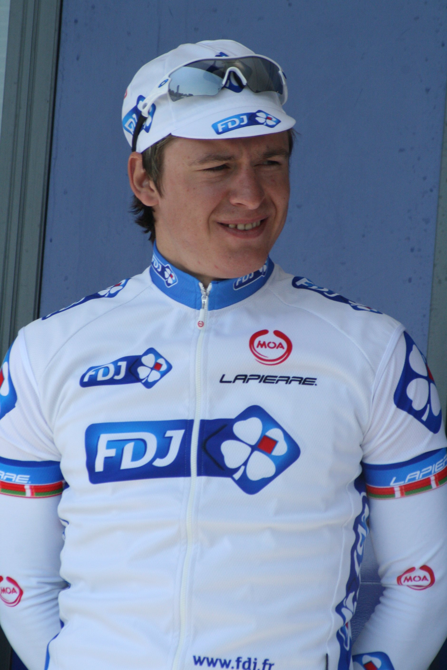 Présentation des coureurs au départ de la première étape Yauheni Hutarovich